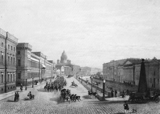 Большая Морская 59-57